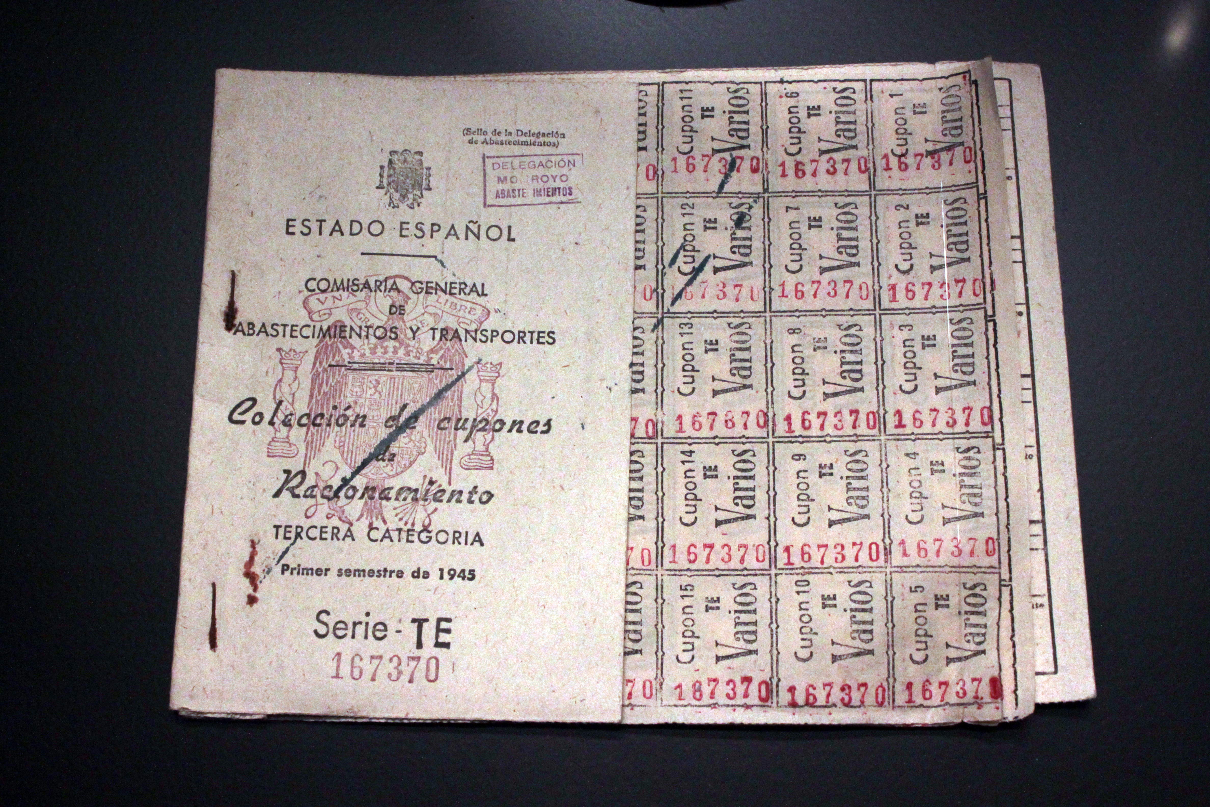 Cartilla de racionamiento de la posguerra española, año 1945. Exposición Historia del Dinero. Depositada en el Museo de Prehistoria de Valencia, Comunidad valenciana, España.